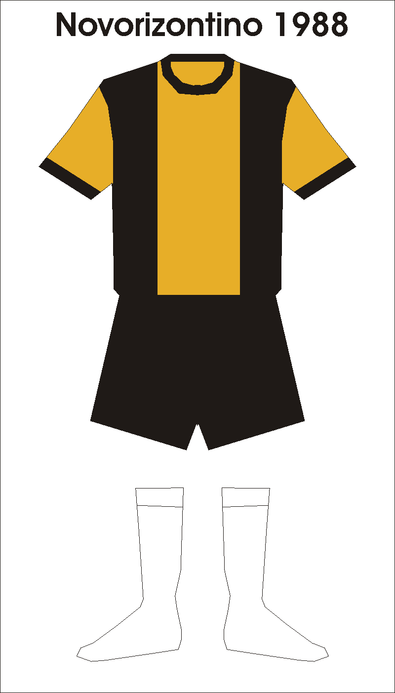 1988 Grêmio Esportivo Novorizontino home kit.